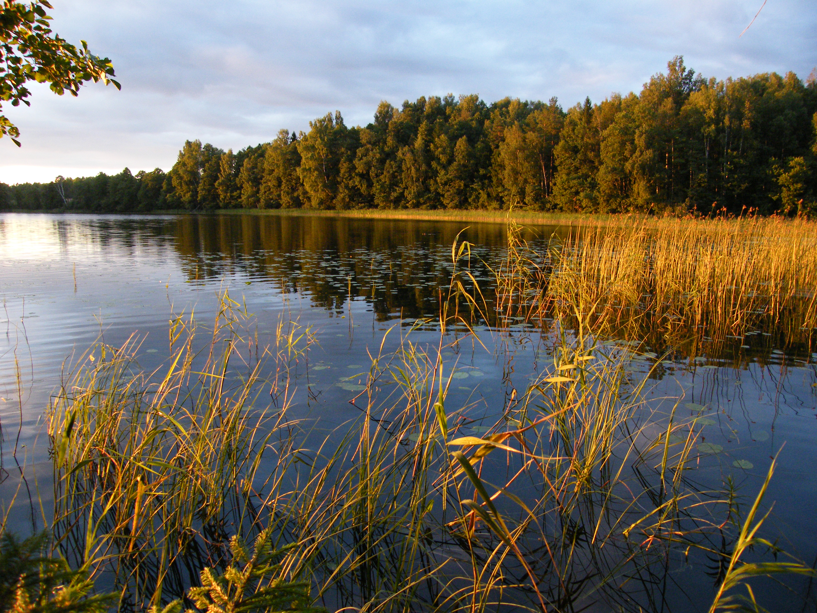 Озеро Лошамьё на закате летом